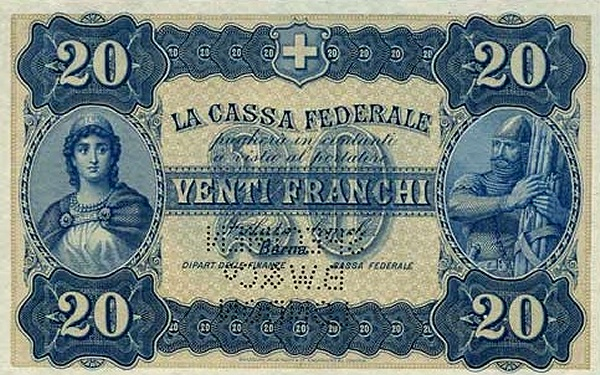 Svájci 1914-es 20 frankos államjegy olasz felirattal.